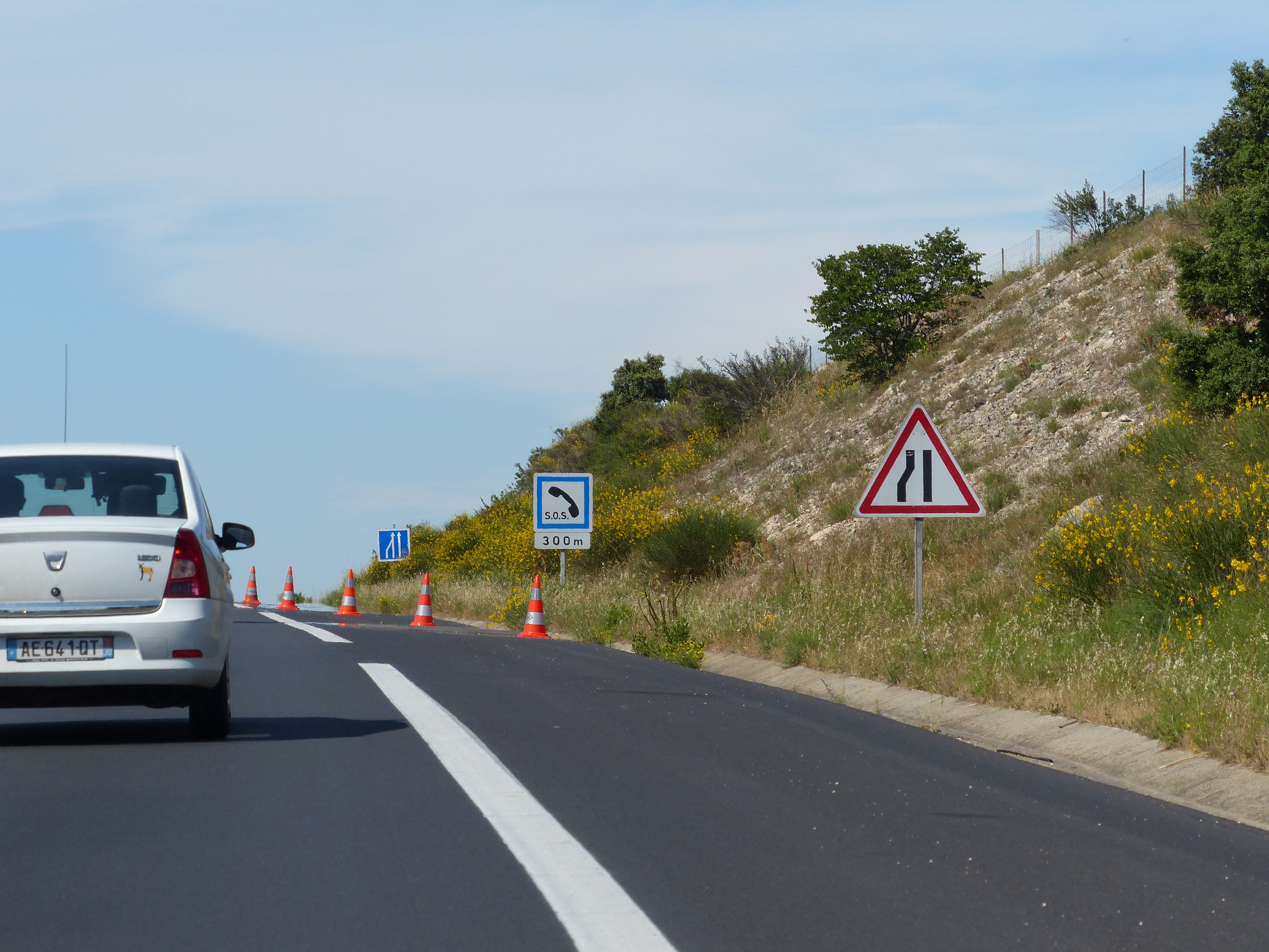 Panneaux A3b, CE2a et C28, autoroute A9, Fournès, Gard, France.